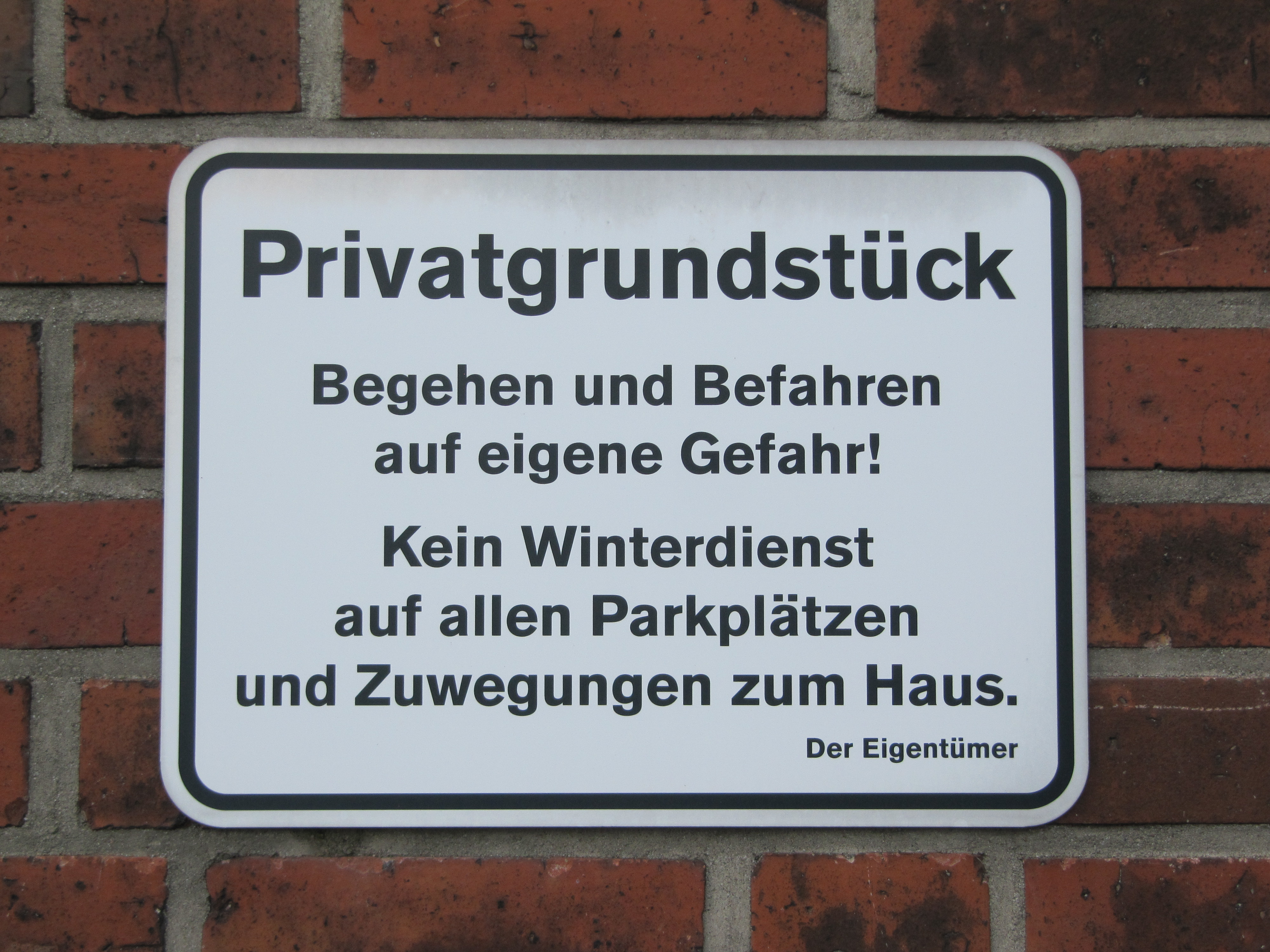 Hinweisschild auf ein Privatgrundstück in Hamburg-Horn.